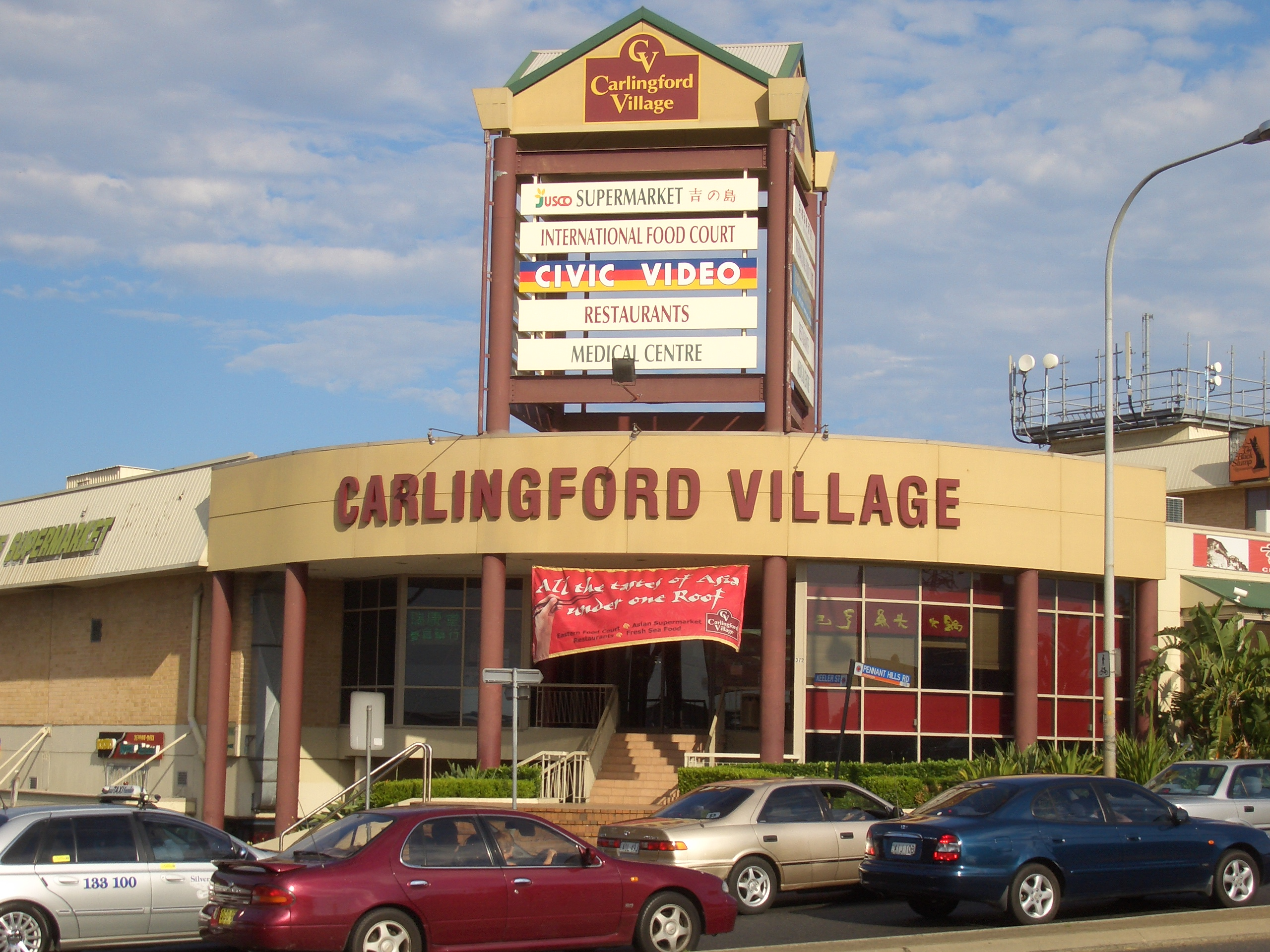 Carlingford Village, Sydney